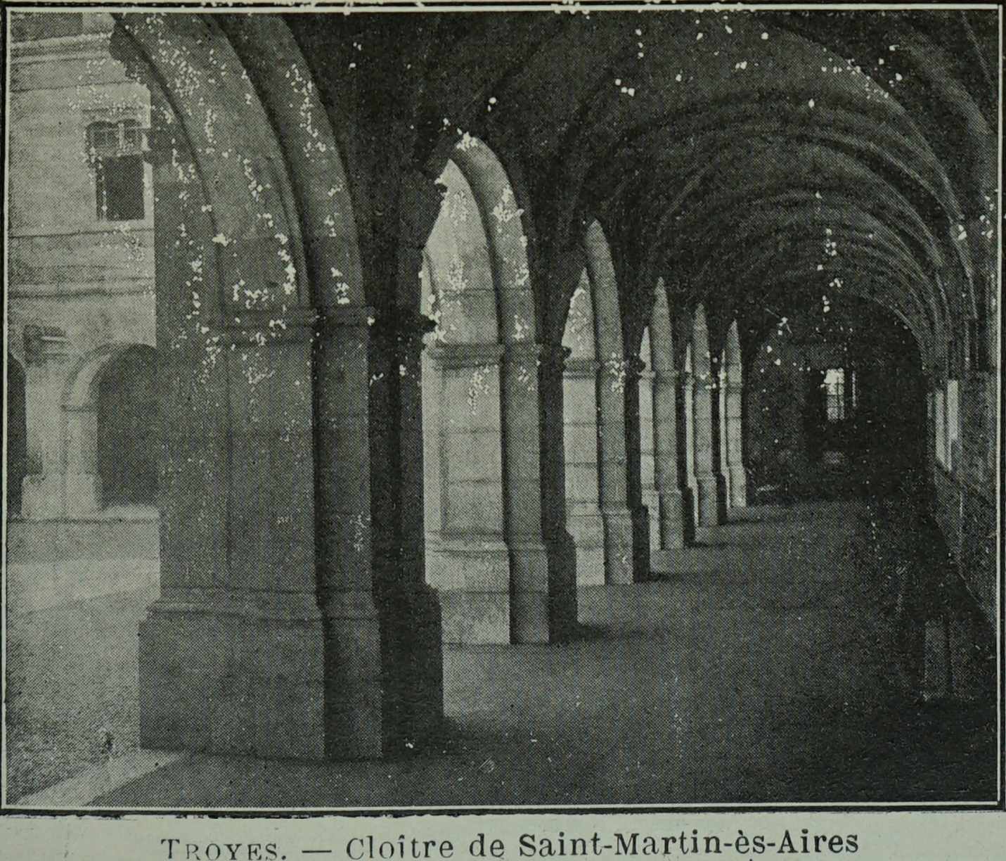 cloitre de Abbaye Saint-Martin-ès-Aires